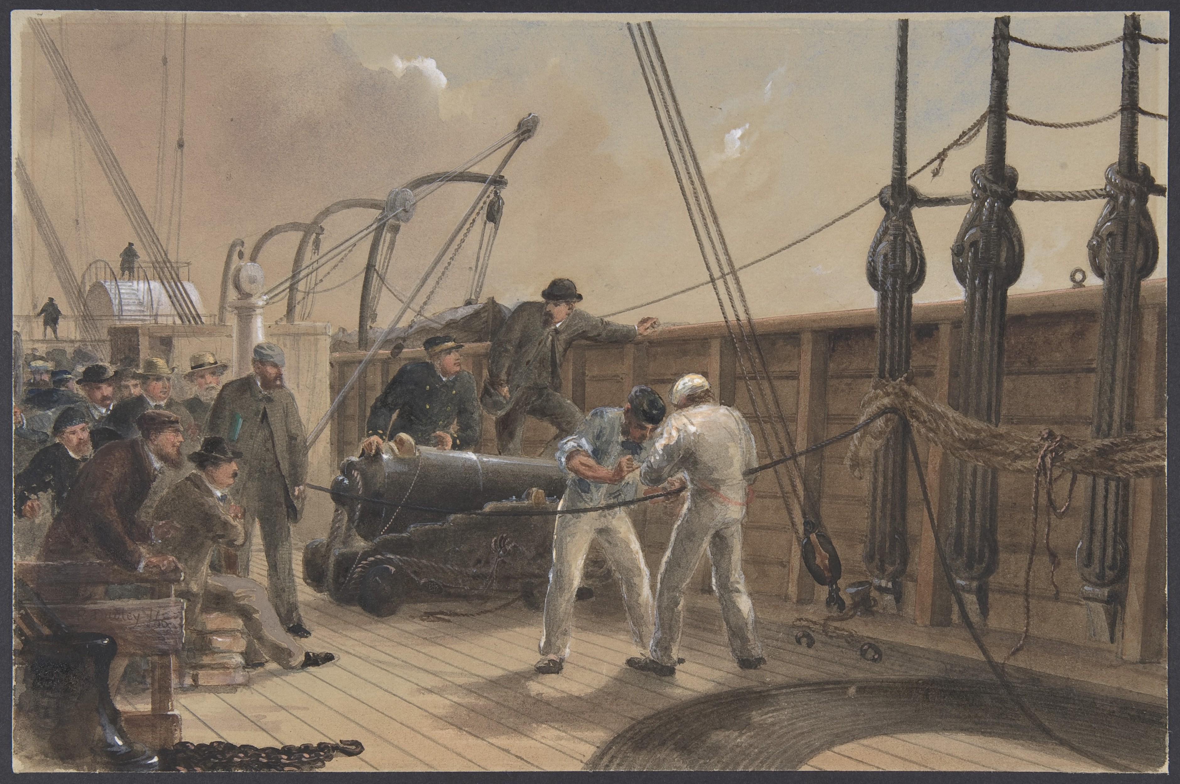 Drawing; Drawings